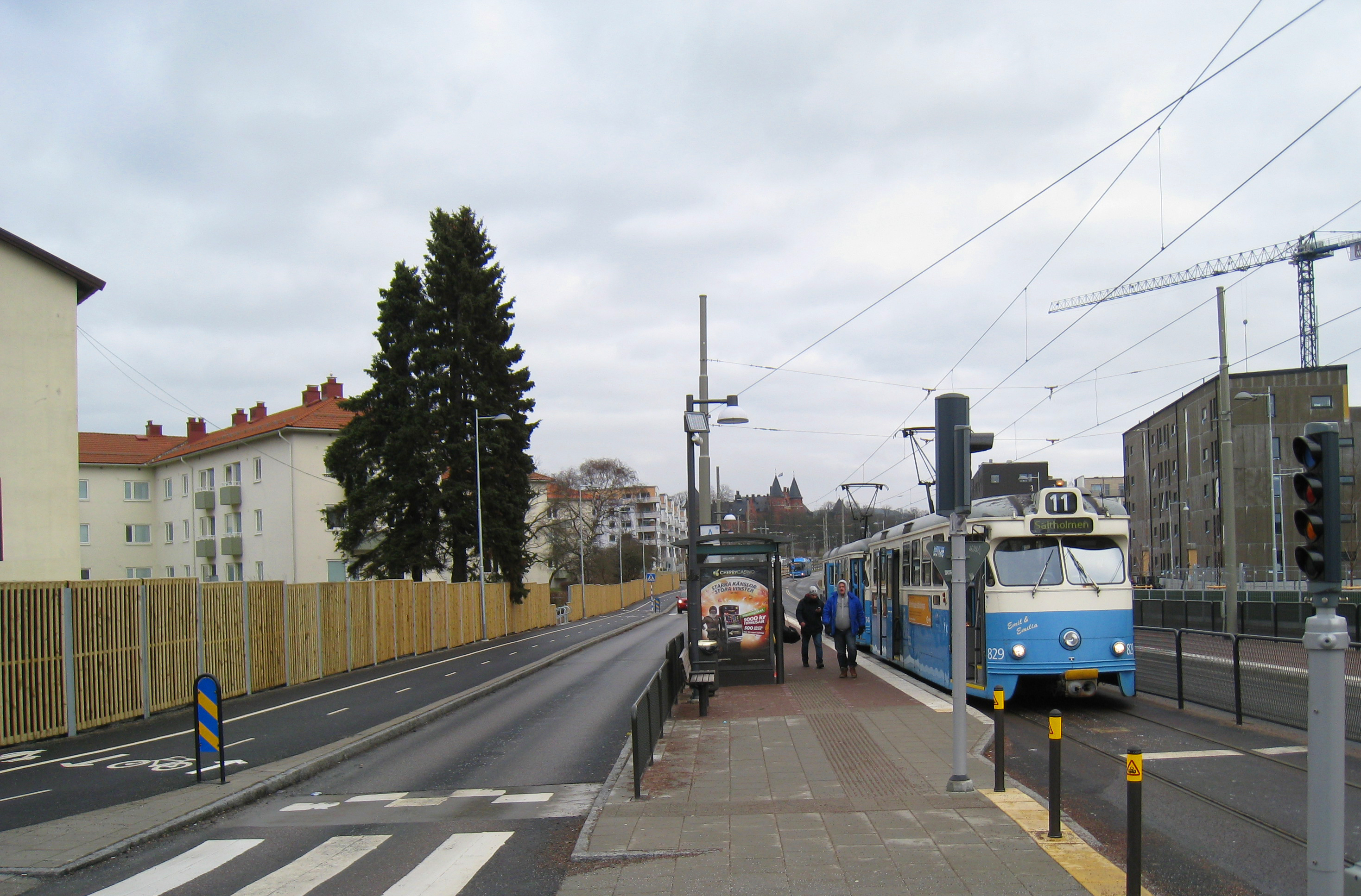 Bellevue, Göteborg. Hållplats för spårvagn och buss.